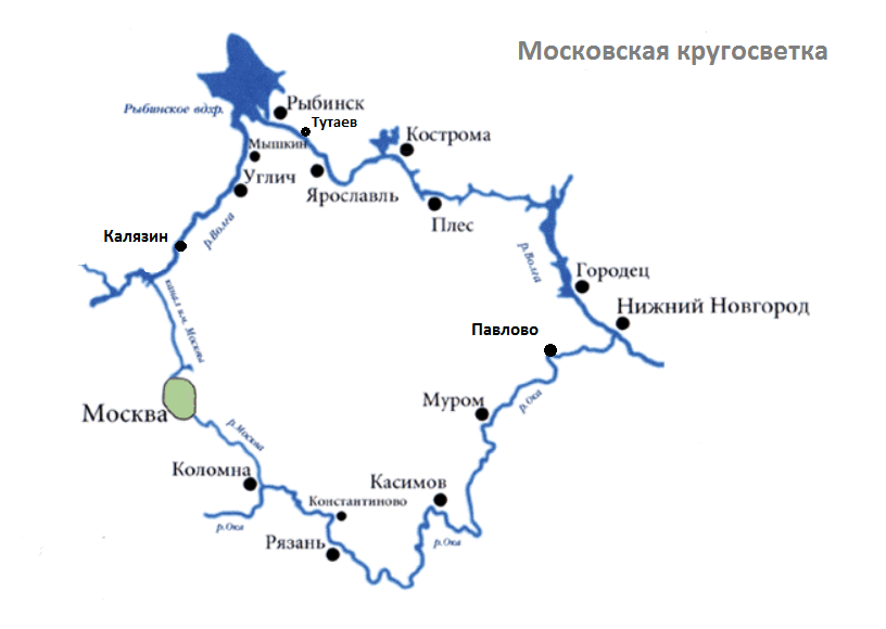 Речной маршрут "Московская кругосветка" на схеме рек. Кружочки - города, в которых теплоходы делают стоянки.